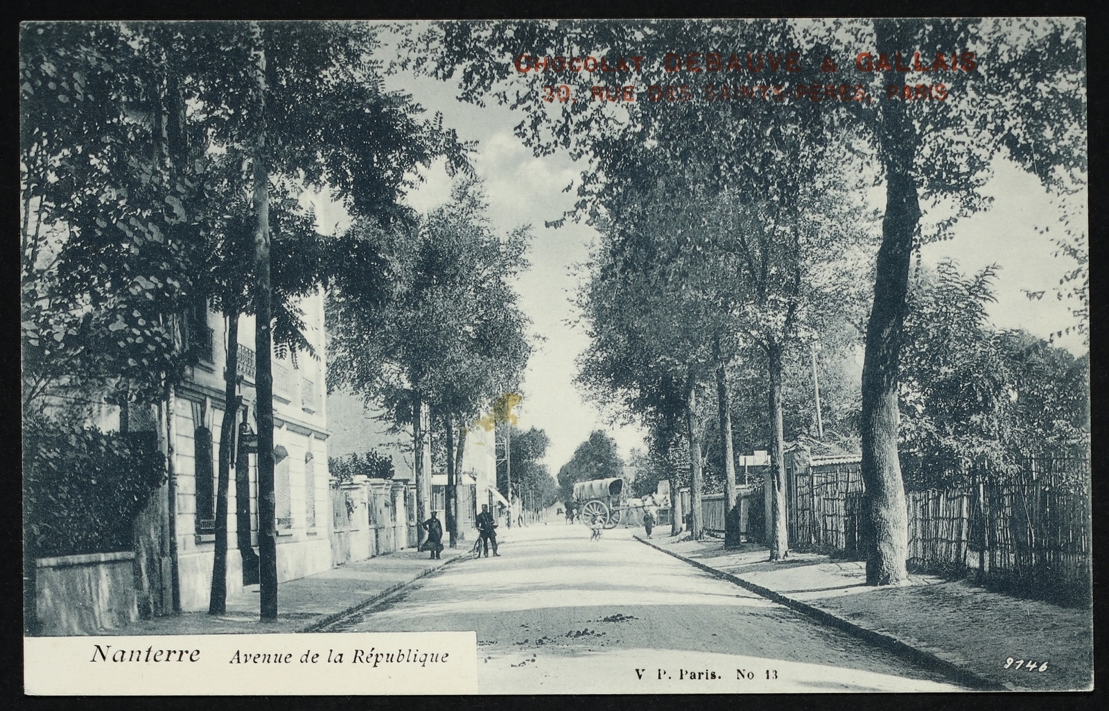 Nanterre.Avenue de la République.Carriole